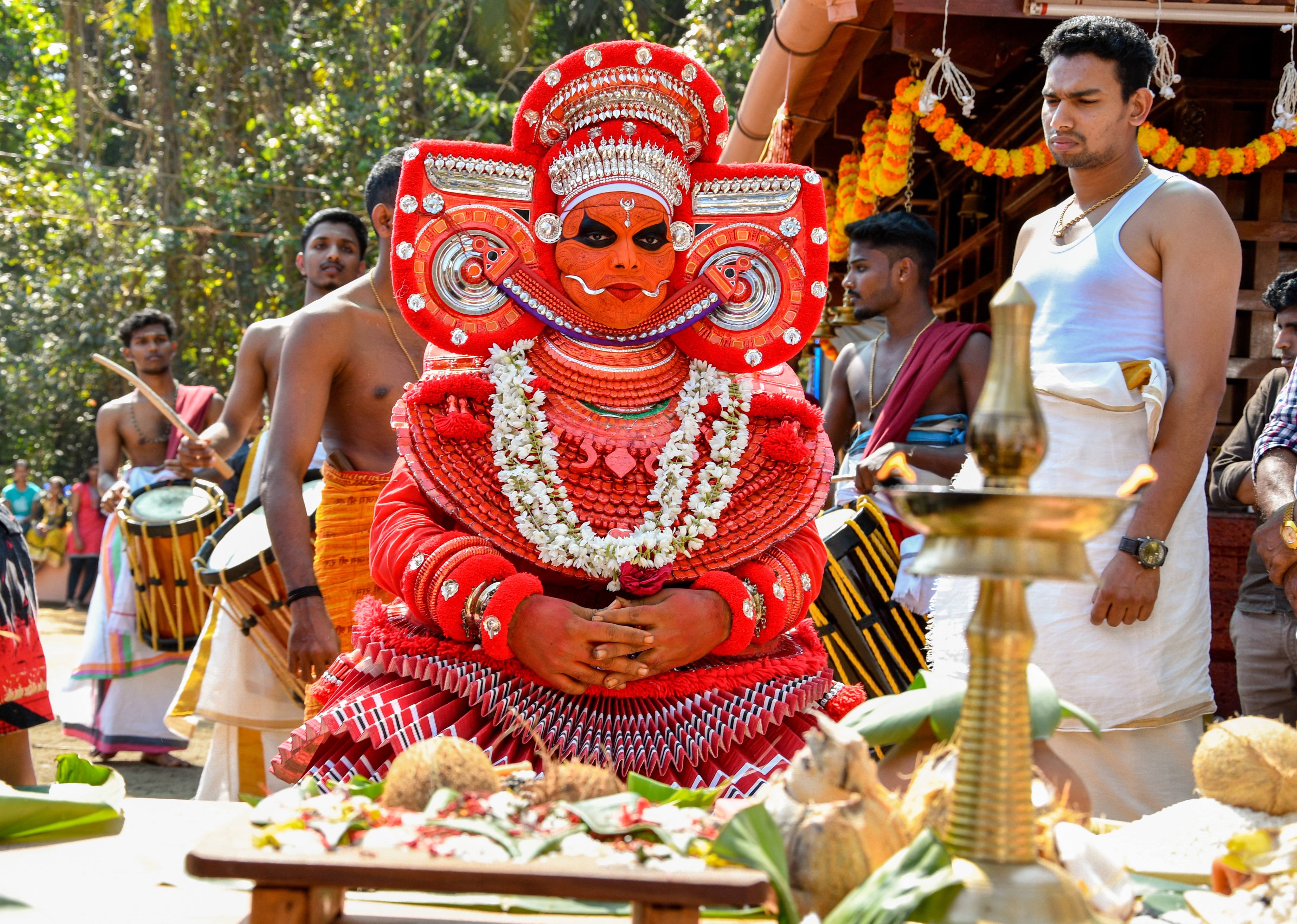 Porkkali Theyyam at Muzhappilangad